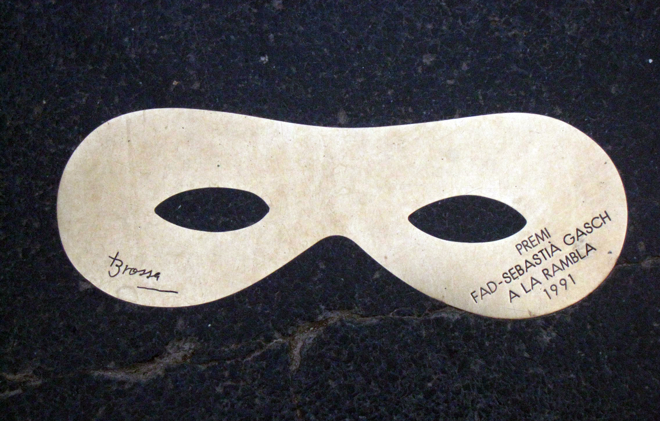 L'Antifaç (Joan Brossa). La Rambla, davant de l'església de Betlem (Barcelona)